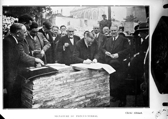 Fonds Trutat - Photographie ancienne Cote : BIBLC26 Localisation : Fonds ancien (S 30) Original non communicable Titre : Pose de la première pierre de la Bibliothèque municipale de Toulouse, rue de Périgord, le 25 juin 1932 Auteur : Trutat, Eugène Rôle de l’auteur : Photographe Lieu de création : Toulouse (Haute-Garonne) Date de création : 1932 Observations : Etaient présents lors de la pose de la première pierre de la bibliothèque : Jules Julien (adjoint délégué à l'Instruction publique, faisant fonction de maire), Pol Neveux (Inspecteur général des bibliothèques), Fr. Galabert (bibliothécaire en chef, archiviste de la ville). Mot(s)-clé(s) : -- Extérieur -- Chantier -- Construction -- Bibliothèque -- Groupe -- Haut fonctionnaire -- Costume masculin -- Pierre -- Bibliothèque municipale de Toulouse -- Toulouse (Haute-Garonne) -- Haute-Garonne (Midi-Pyrénées) -- France -- 20e siècle, 2e quart Médium : Photographies -- Noir et blanc -- Scènes Bibliothèque de Toulouse. Domaine public